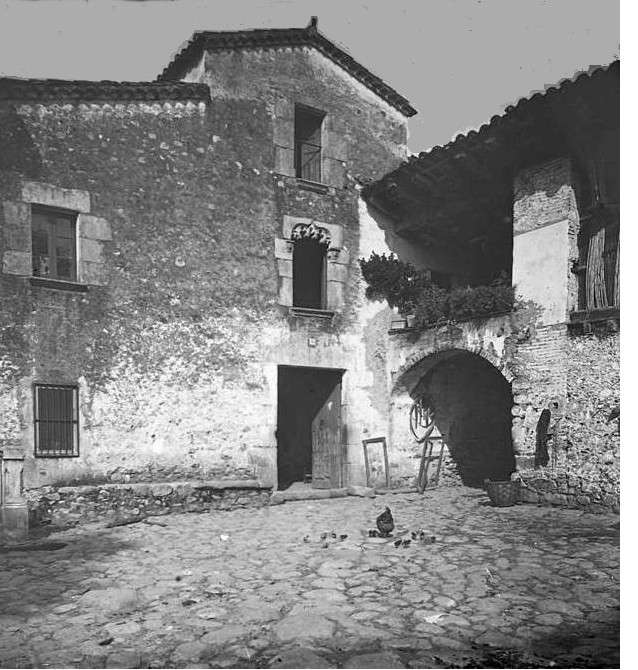 Can Batllori. Josep Salvany i Blanch (1917)